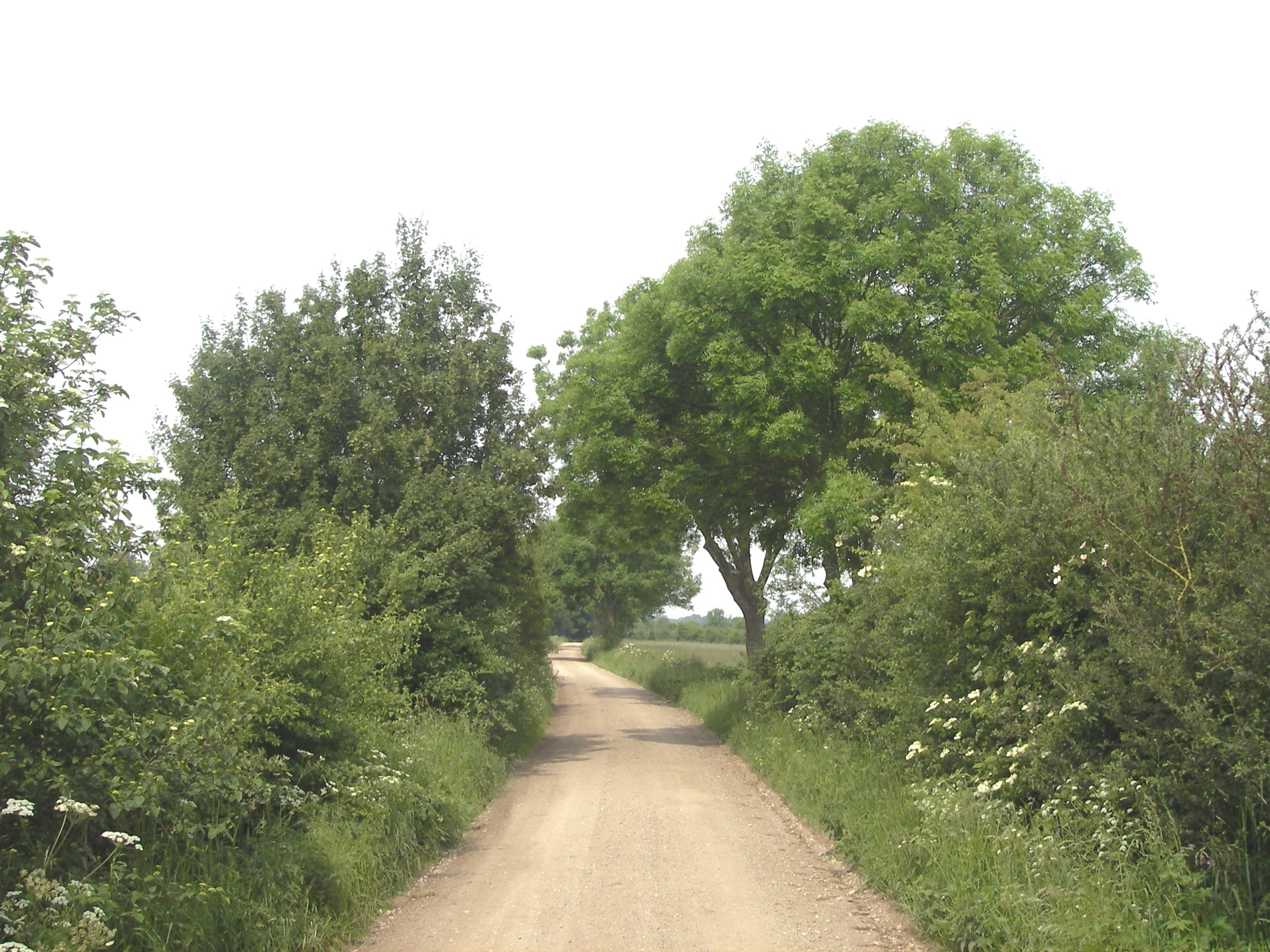 Maasheggenlandschap in de Oeffeltermeent